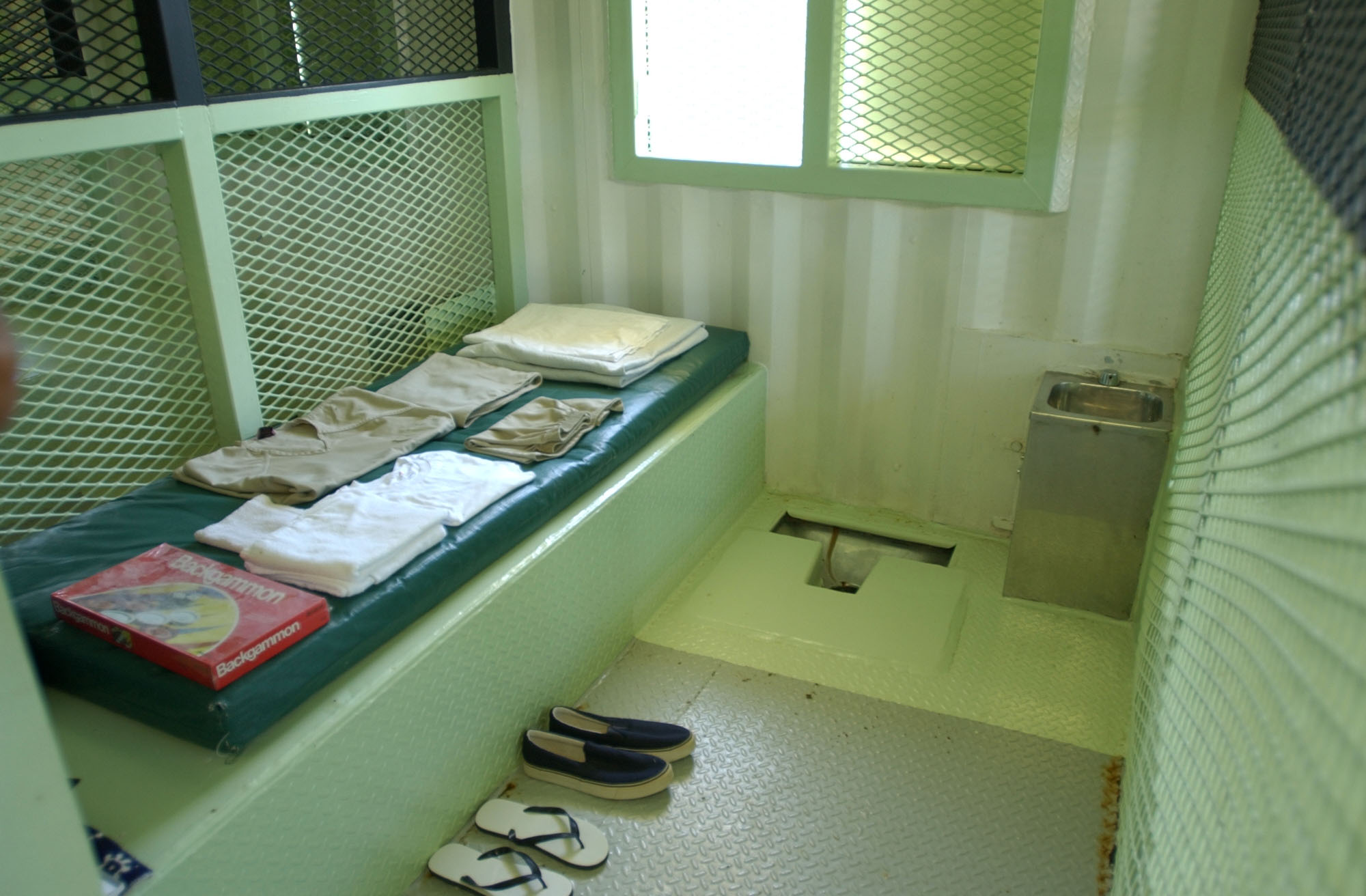 cell of a non-compliant Guantanamo captive